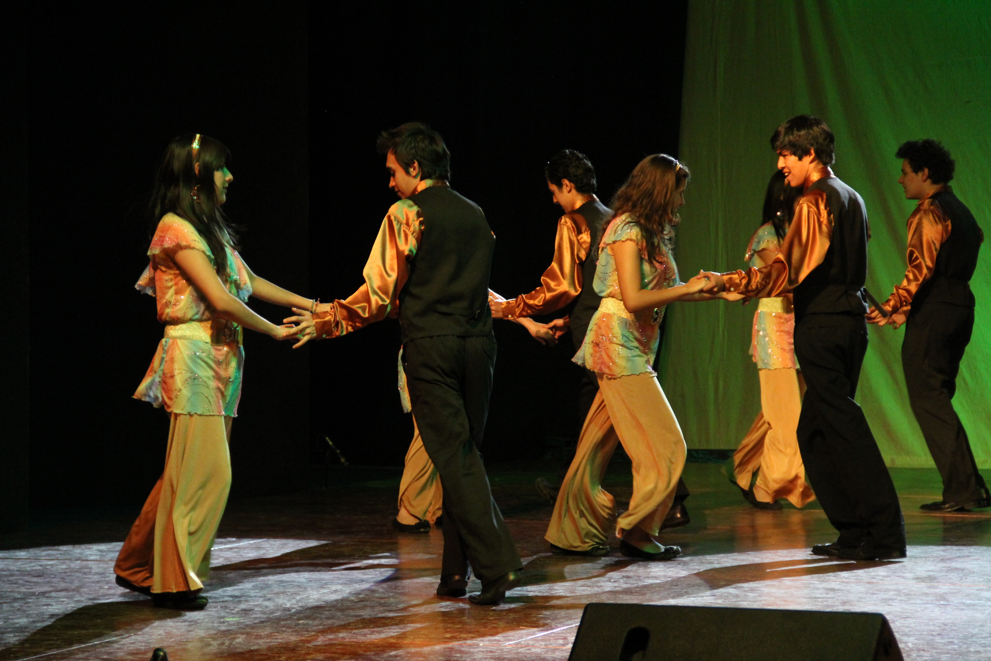 Baile disco durante el evento Semana de la Cultura en ITESM Campus Ciudad de México